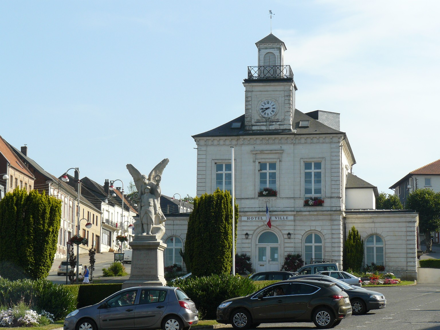 Mairie et monument aux morts de Fruges